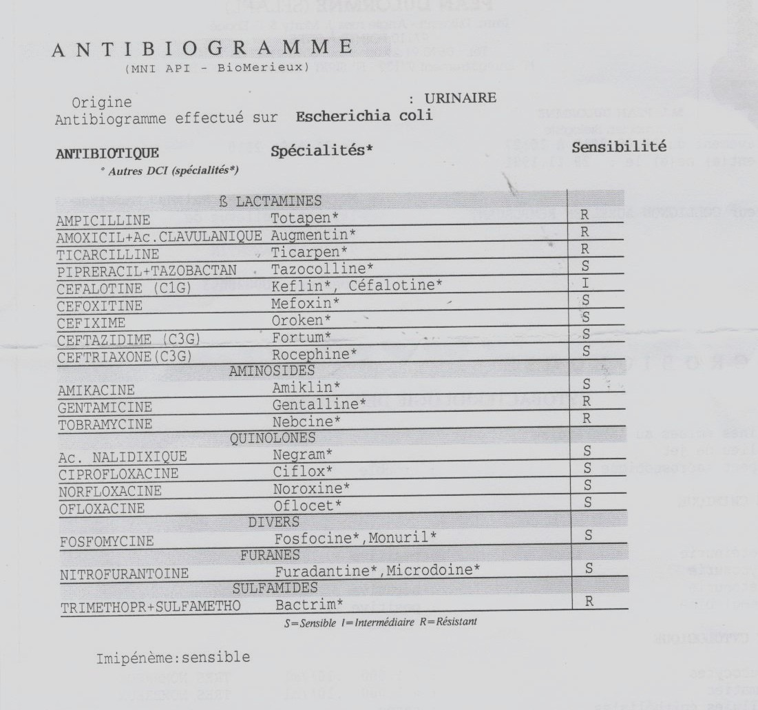 ECBU - antibiogramme - Esherichia Coli